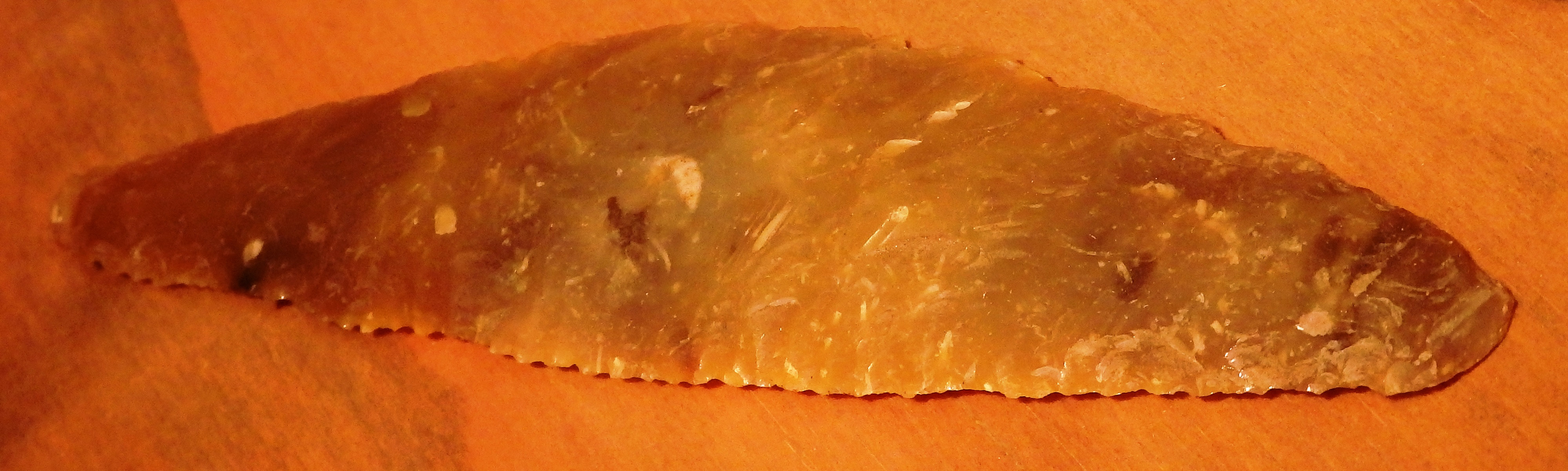 Steinsichel (Flint), ältere Bronzezeit, Museum zeiTTor (Neustadt/Holstein)